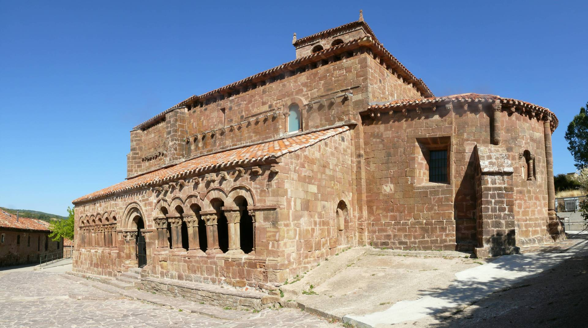 Iglesia de San Sebastián